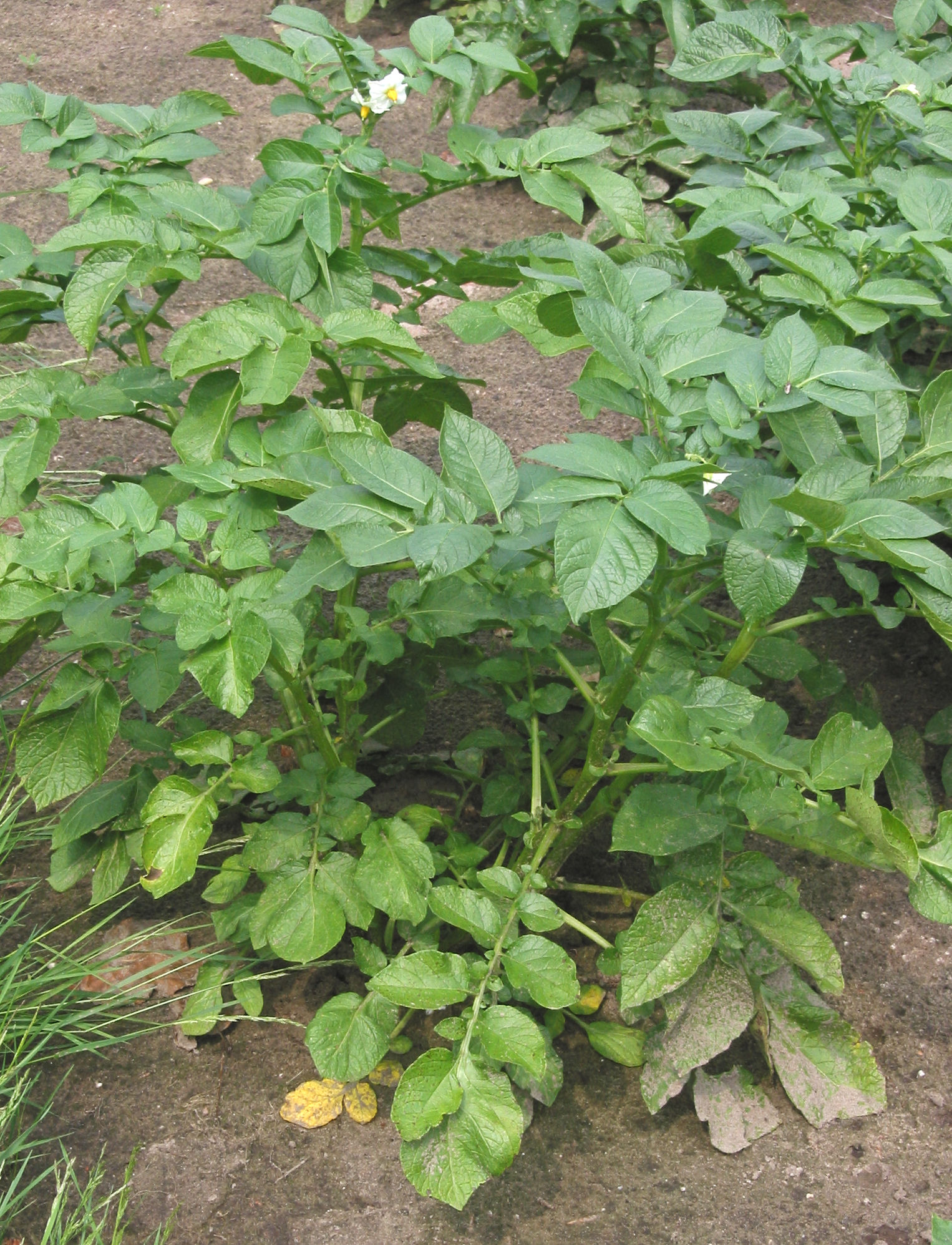 Aardappel (Solanum tuberosum) 'Nicola'